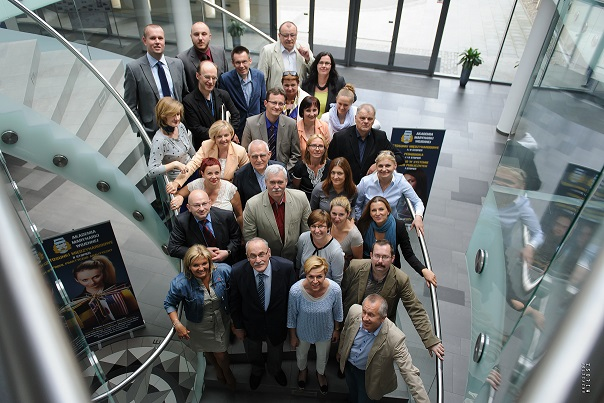 Workers, stairs